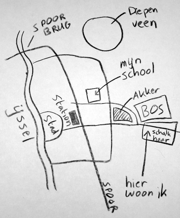 Menntal map, oftewel een cognitieve kaart